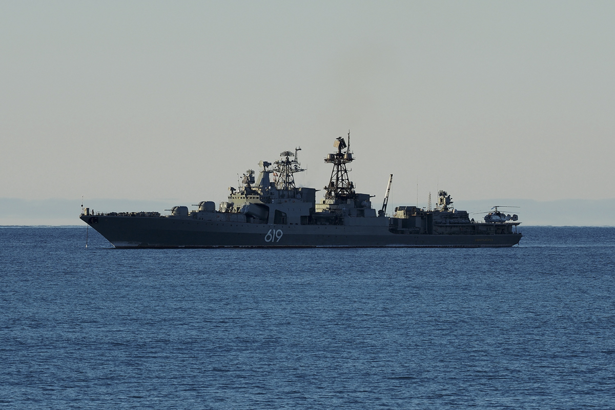 Высадка арктических мотострелков Северного флота на остров Голомянный (архипелаг Северная Земля).